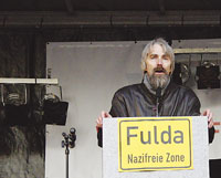 Bundessprecher der VVN-BdA Ulrich Schneider bei einer Rede auf einer Anti-NPD-Kundgebung in Fulda November 2008